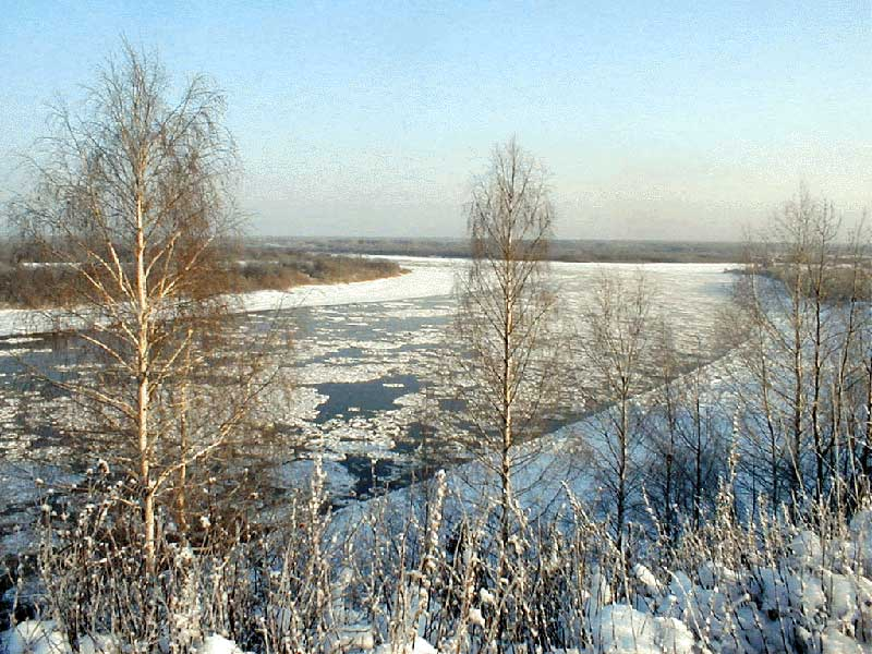 Место впадения реки Чепцы в реку Вятка